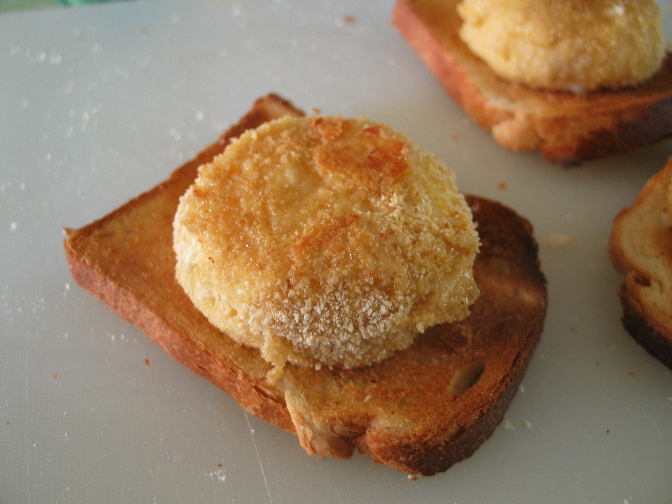 Demi crottin de Chavignol pané sur toast.